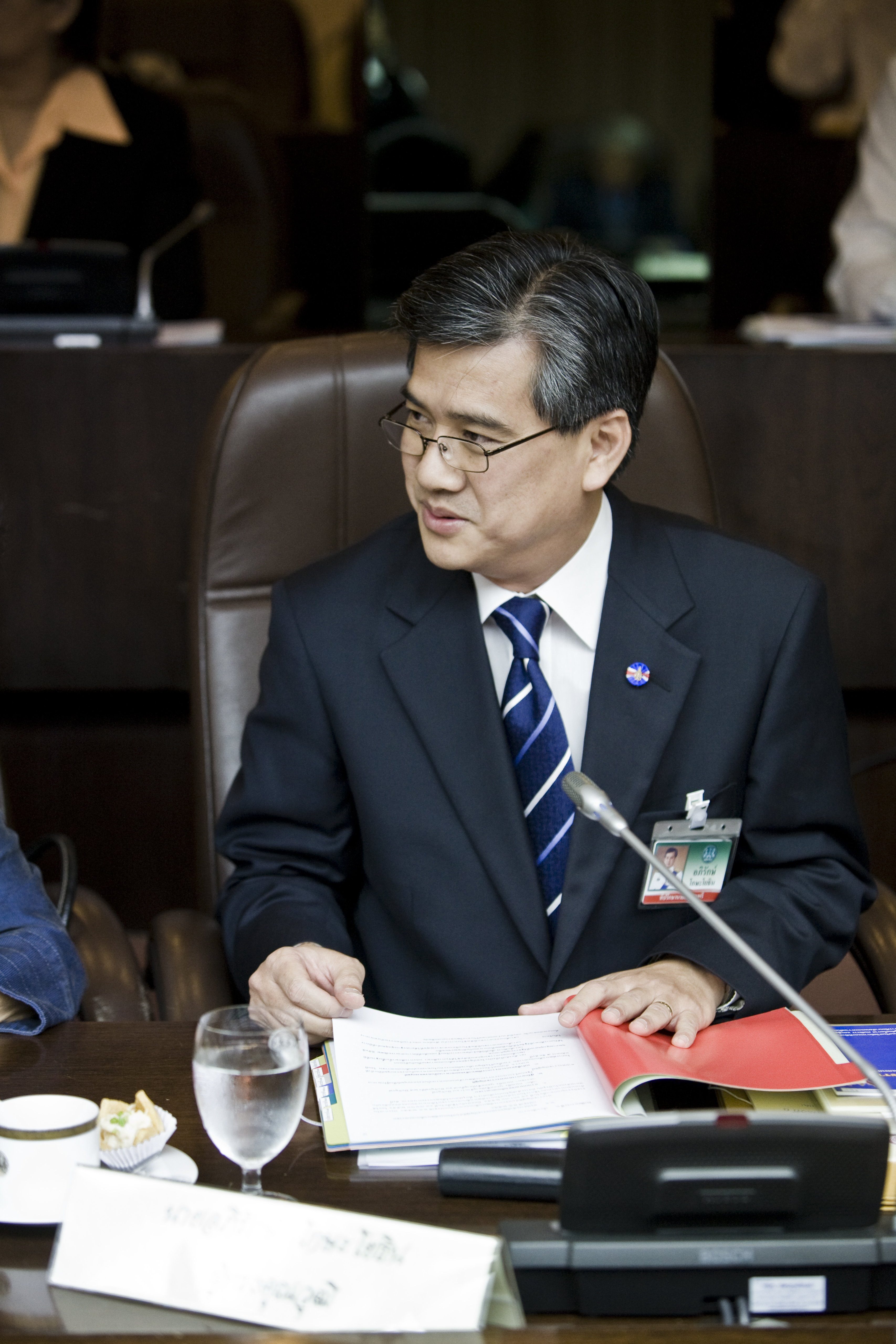 นายกรัฐมนตรี เป็นประธานการประชุมคณะกรรมการส่งเสริมการพัฒนาเด็กและเยาวชนแห่งชาติ ครั้งที่ 1/2552 ณ ห้องประชุม 301 ชั้น 3 ตึกบัญชาการ 1 ทำเนียบรัฐบาล 13สิงหาคม2552 (The Official Site of The Prime Minister of Thailand Photo by พีรพัฒน์ วิมลรังครัตน์)